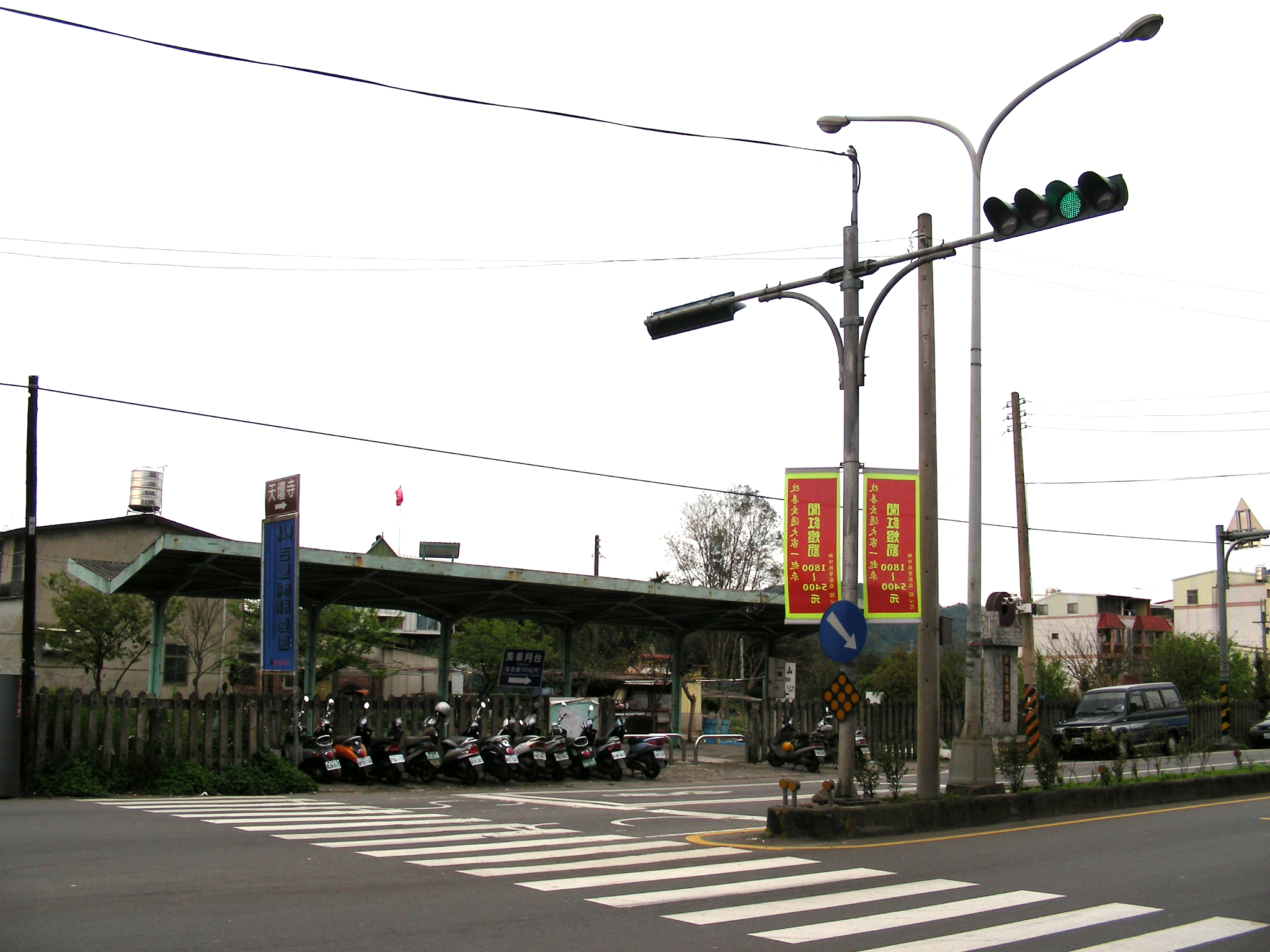 Taiwan "Heng Sang" Railway Station (Old)